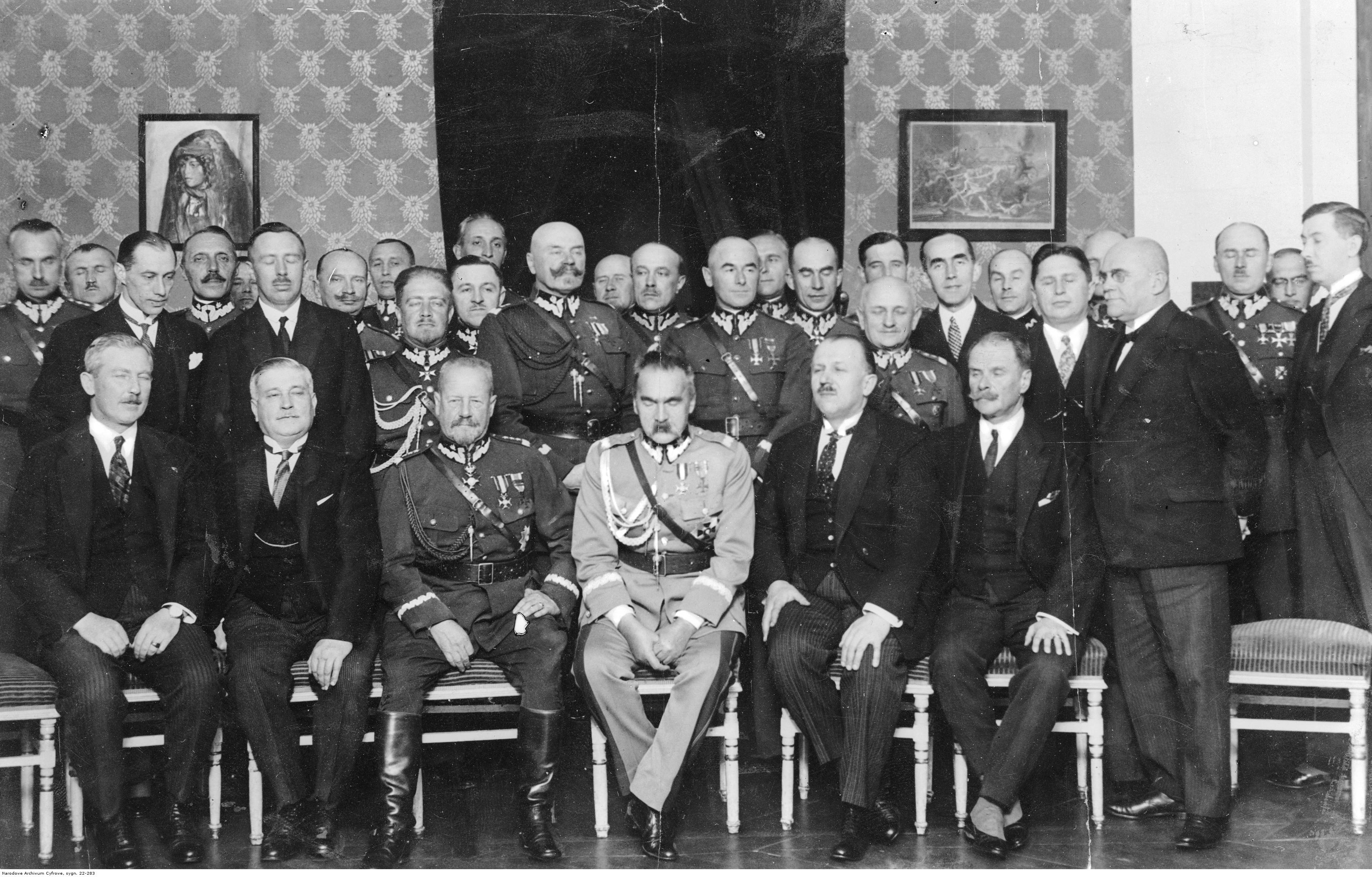 Fotografia grupowa uczestników pożegnalnego śniadania zorganizowanego przez marszałka Józefa Piłsudskiego na cześć gen. Lucjana Żeligowskiego. W pierwszy rzędzie siedzą od lewej: Paweł Romocki, Gabriel Czechowicz, gen. Lucjan Żeligowski, marszałek Józef Piłsudski, Kazimierz Bartel, Karol Niezabitowski. W drugim rzędzie stoją m.in.: Bogusław Miedziński (1. z lewej), gen. Jakub Krzemieński (3. z lewej), gen. Daniel Konarzewski (4. z lewej), gen. Edward Śmigły-Rydz (5. z lewej), gen. Jan Romer (6 z lewej), Eugeniusz Kwiatkowski (1. z prawej). W trzecim rzędzie widoczni m.in.: gen. Kazimierz Sosnkowski (1. z lewej), gen. Jan Wróblewski (2. z lewej), gen. Juliusz Rómmel (3. z lewej), gen. Tadeusz Piskor (4. z lewej). W ostatnim rzędzie widoczni m.in.: gen. Ferdynand Zarzycki (1. z lewej), gen. Gustaw Orlicz-Dreszer (4. z lewej). Aleksander Prystor (5. z lewej), gen. Mieczysław Norwid-Neugebauer (za Niezabytowskim), gen. Tadeusz Kutrzeba (na prawo za Śmigłym-Rydzem), gen. Leon Berbecki (na prawo od Kutrzeby).